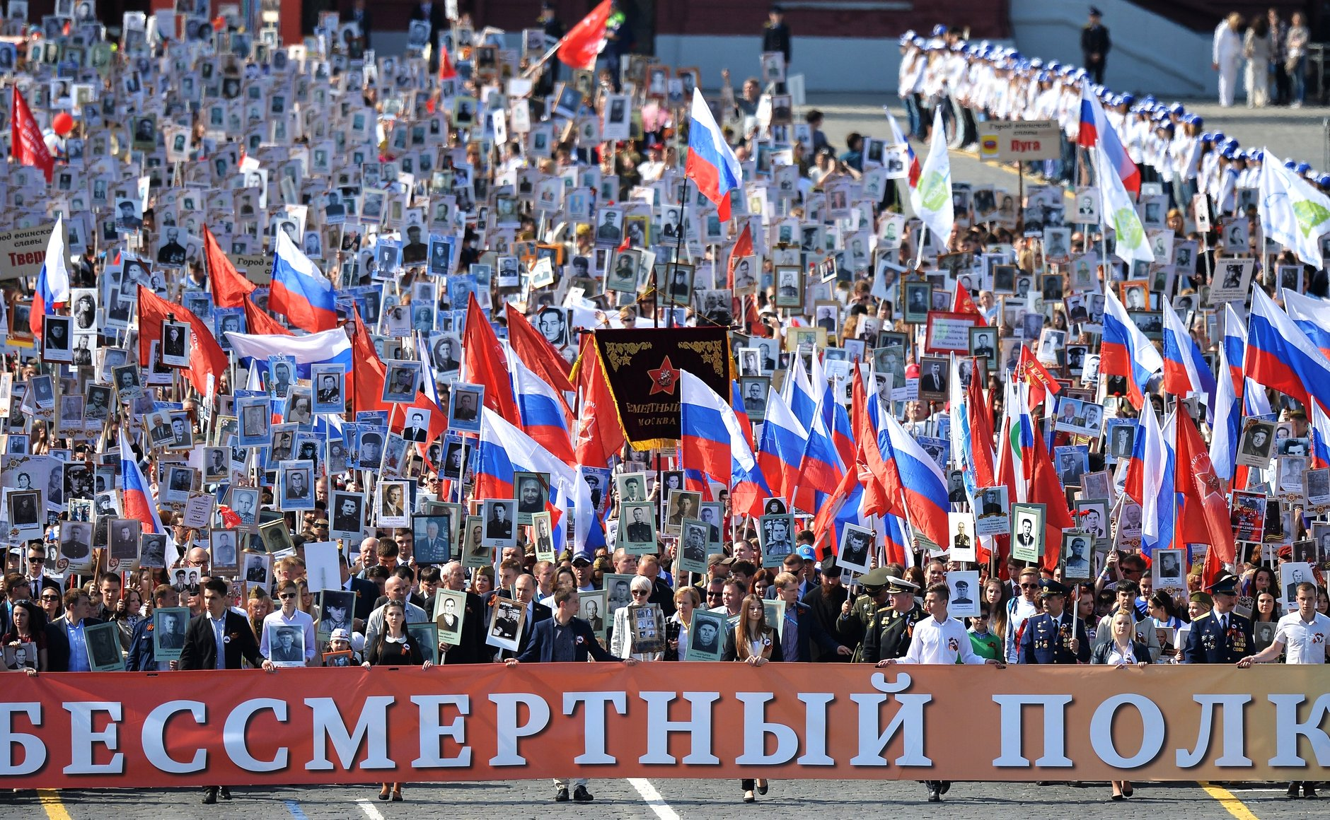 Шествие региональной патриотической общественной организации «Бессмертный полк» В День Победы Владимир Путин принял участие в акции «Бессмертный полк». Глава государства с портретом своего отца-фронтовика присоединился к шествию колонны на Красной площади.